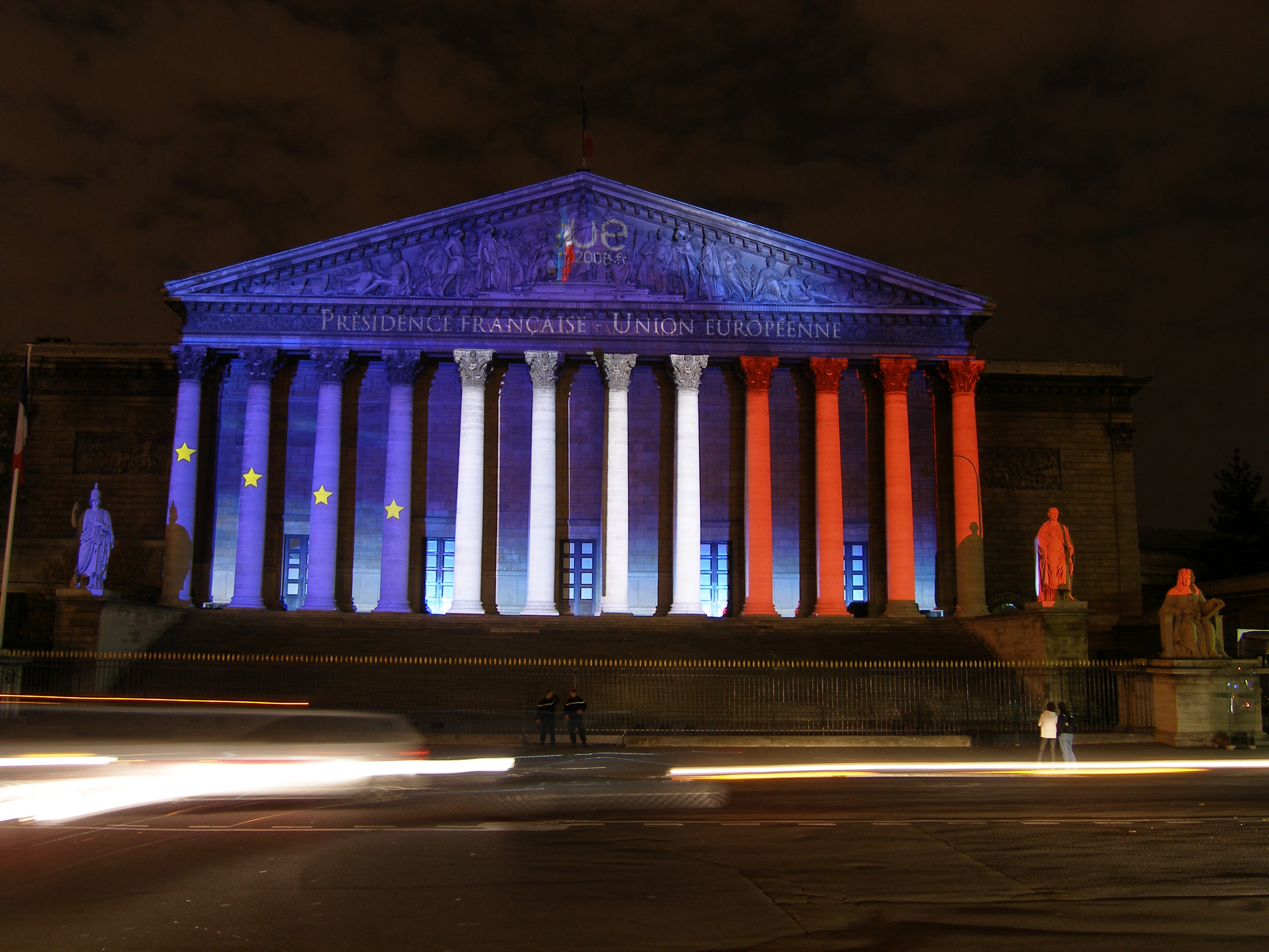 Assemblée nationale : illuminations pour la Présidence française de l'Union Européenne